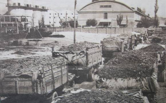 Bodega CAVIC, provincia de San Juan (Argentina) en el momento de la molienda de uva en el año 1970.